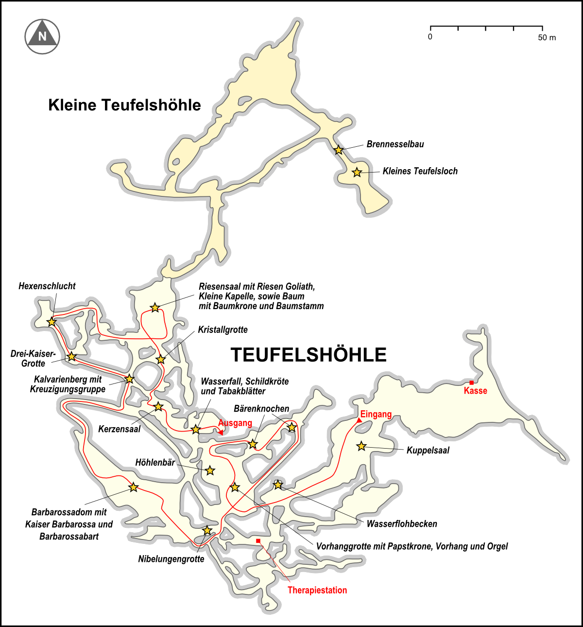 Karte von Teufelshöhle bei Pottenstein